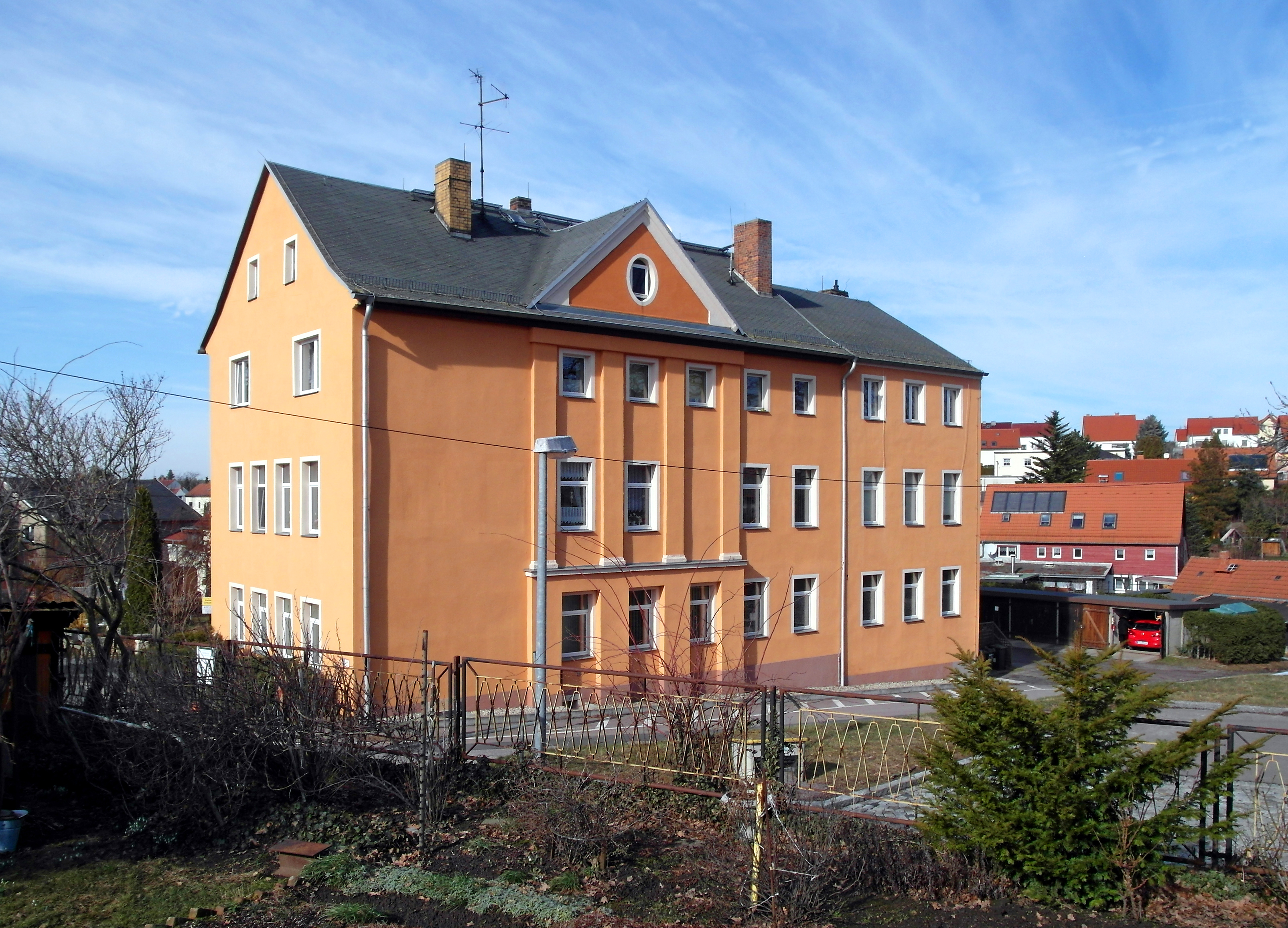 23.02.2019 01737 Braunsdorf (Wilsdruff), Straße der LPG 2 (GMP: 51.016828,13.572684): Rittergut Braunsdorf, Herrenhaus. Das Rittergut war ein Afterlehen der Herrschaft Liebstadt und seit dem 17. Jahrhundert meist im Besitz Bürgerlicher. Das Herrenhaus ließ 1797 der Rittergutsbesitzer Carl Friedrich Auenmüller errichten. 1832 kam der seitliche Anbau hinzu. Nach der Enteignung des letzten Gutsbesitzers Arno Pötzsch wurde das Haus zunächst als Schule genutzt, dann aber in den 1980er Jahren zu Wohnzwecken umgebaut. 2007 verkaufte die Stadt Wilsdruff das Gebäude an einen privaten Eigentümer, der es sanierte. Heute sind im Herrenhaus Arztpraxen und Wohnungen. [SAM9612.JPG]20190223100DR.JPG(c)Blobelt